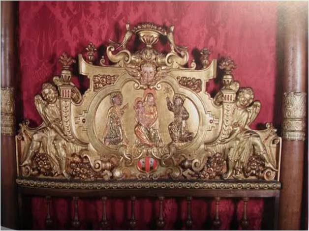 Llit